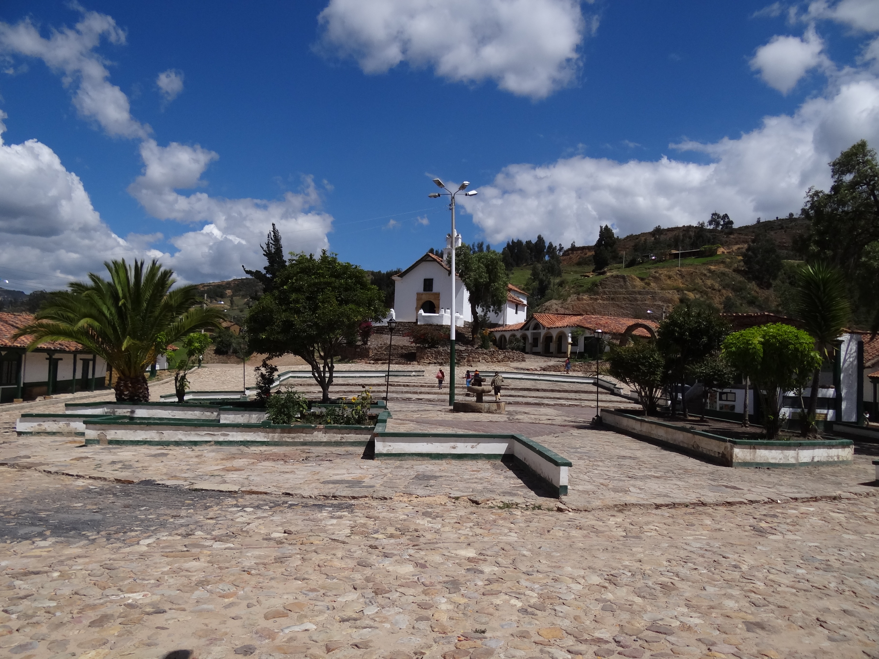 Área urbana del municipio de Chíquiza, departamento de Boyacá, Colombia